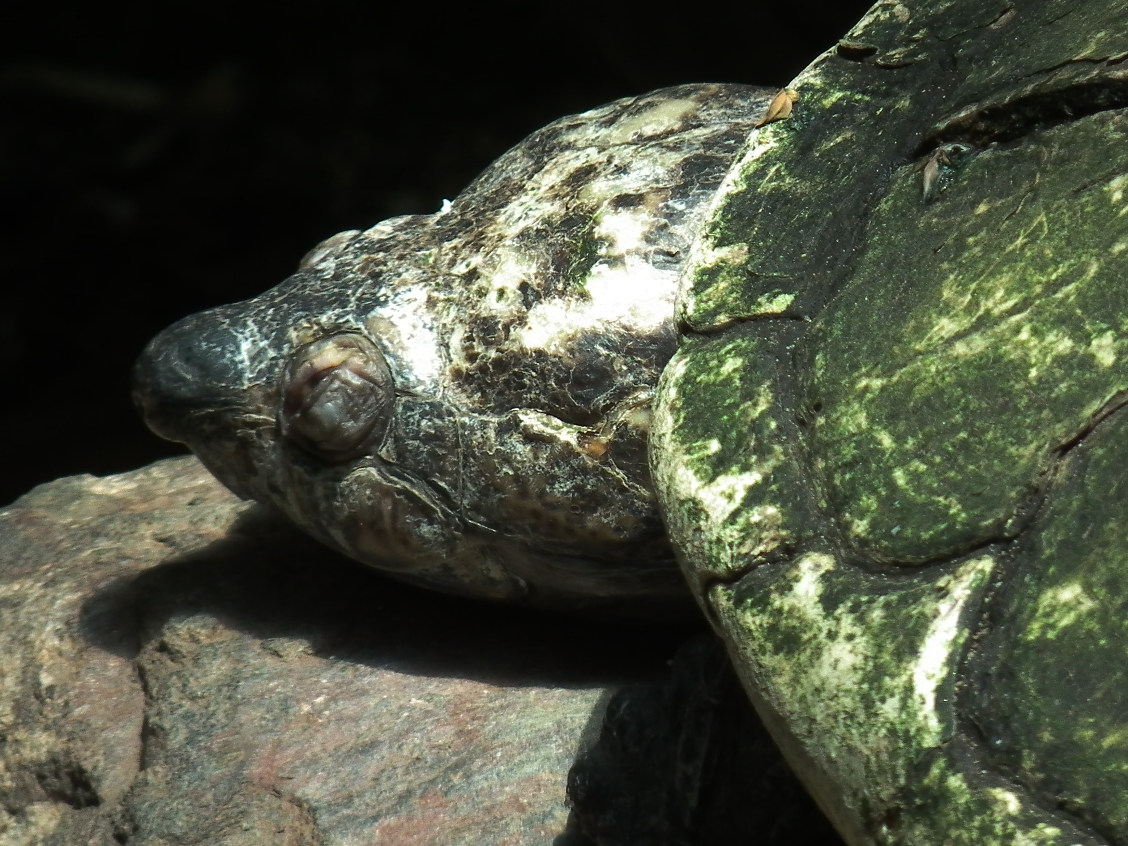 Madagaskar-Schienenschildkröte (Erymnochelis madagaskariensis), fotografiert im Zoo Landau (Rheinland-Pfalz, Deutschland)